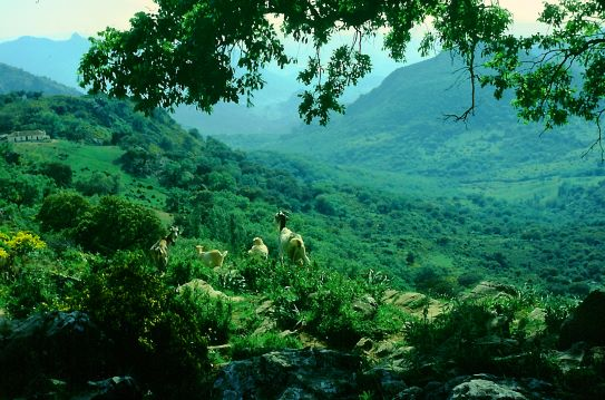 Description = Sierra del Caíllo in Sierra de Grazalema natural park, Andalusia, Spain Date = year 2002 Author = Jürgen Paeger